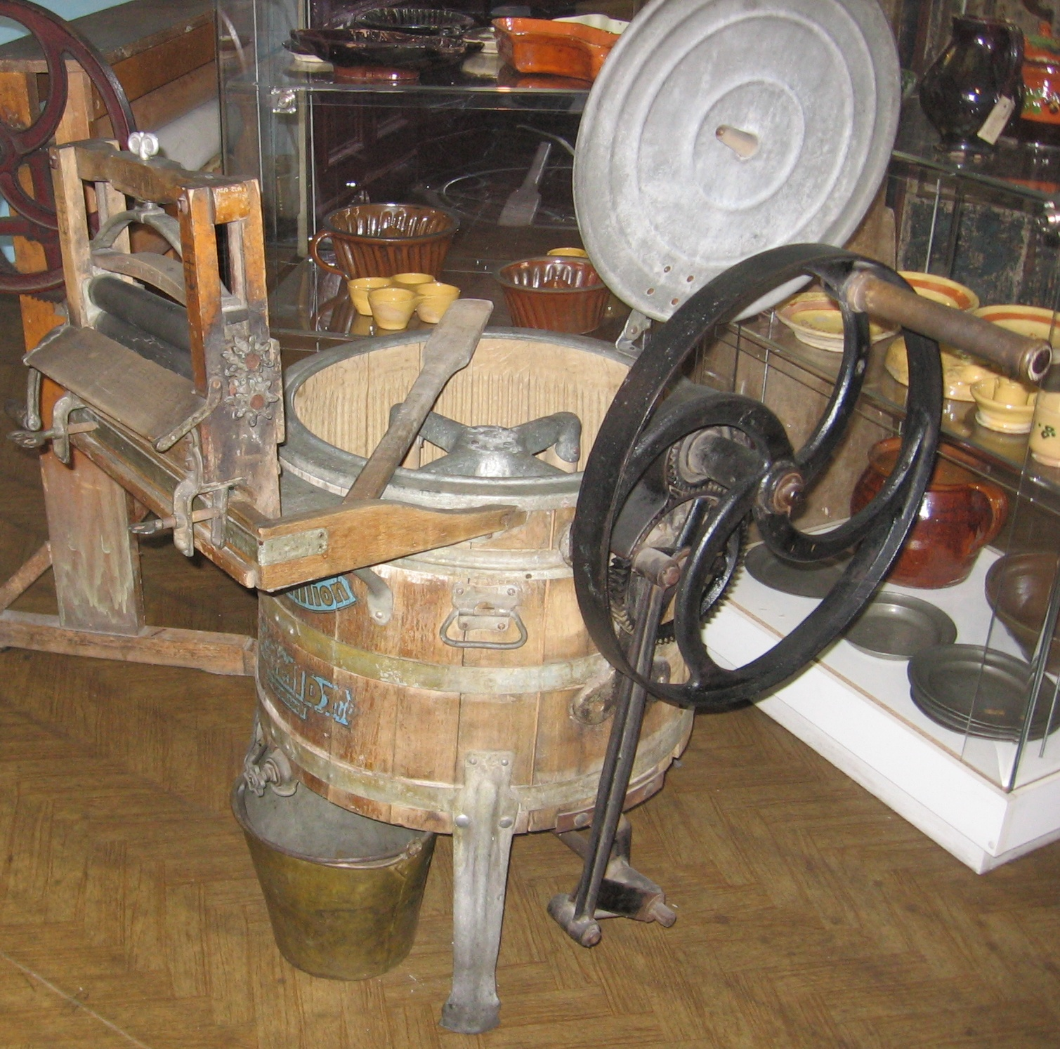 pralka ręczna ze zbiorów Muzeum Gospodarstwa Domowego w Ziębicach